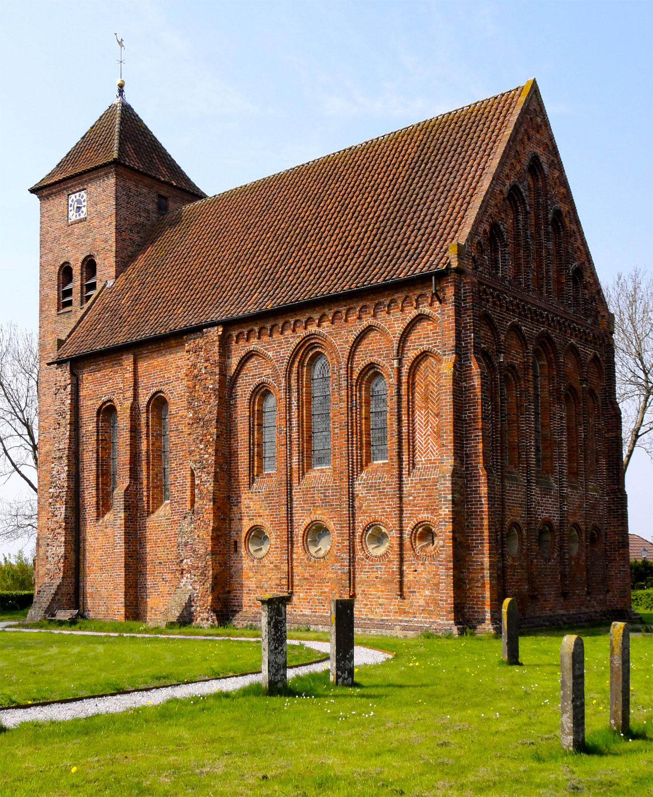 Sint-Ursuskerk van Termunten